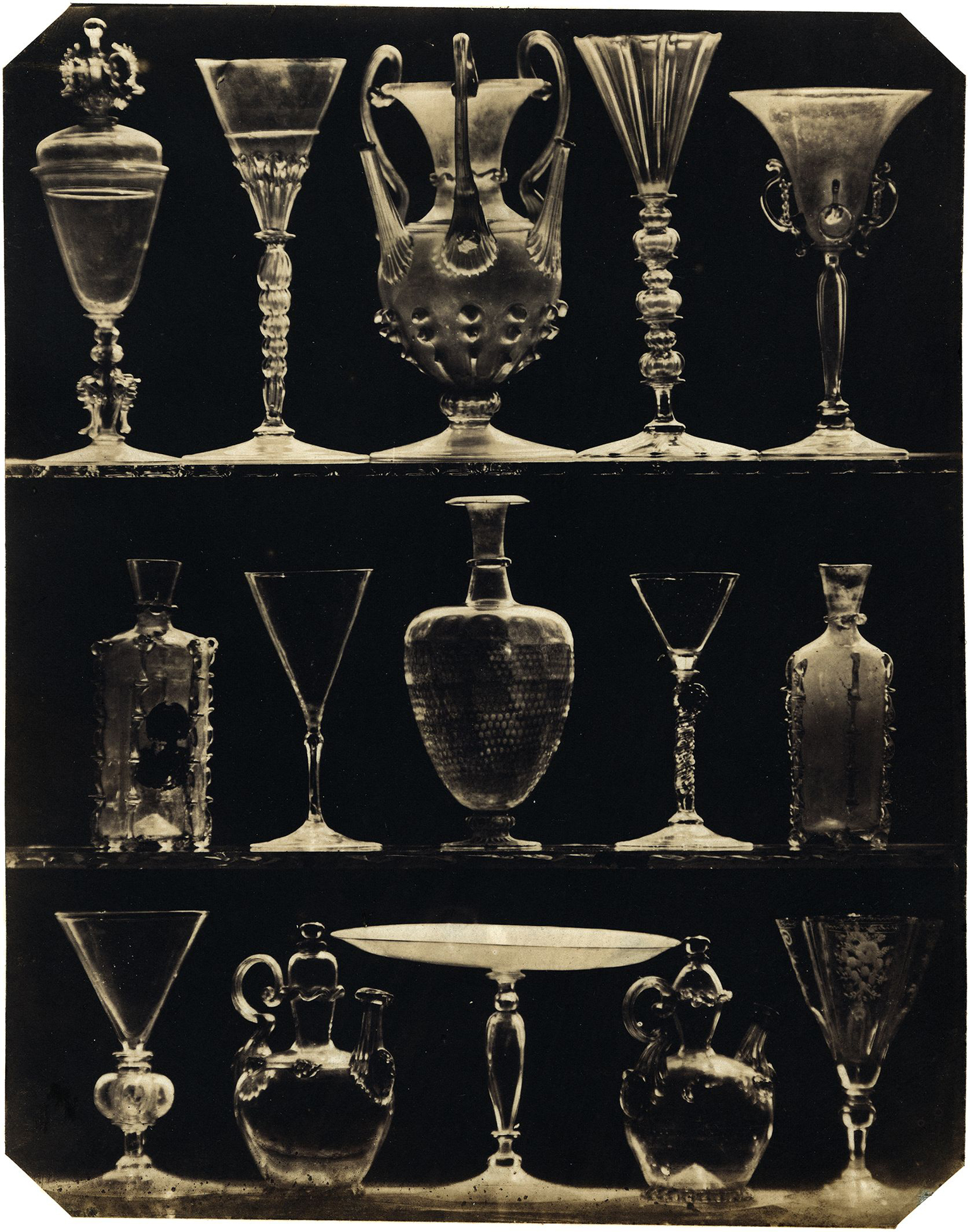 15 Venezianische Glasgefäße, 15. und 16. Jahrhundert, Liegnitz, 1853/54 Salzpapier